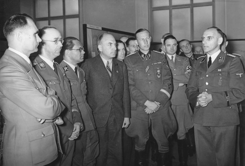 Ausstellung "Planung und Aufbau im Osten" Scherl: Der Stellvertreter des Führers, Reichsminister Rudolf Hess, besichtigte in Berlin eine vom Reichsführer SS Heinrich Himmler durchgeführte Ausstellung über Aufbau und Planung im Osten. Dabei machte der Reichsführer der SS in seiner Eigenschaft als Reichskommissar zur Festigung des deutschen Volkstum grundsätzliche Ausführungen über die geplante bäuerliche Siedlung in den wiedergewonnenen Ostgebieten und erläuterte sie eingehend an Hand von Modellen und Zeichnungen. - Man sieht (von links nach rechts) den Stellvertreter des Führers Rudolf Hess, Reichsführer SS Himmler, Reichsleiter Bouhler, Reichsminister Dr. Todt, Gruppenführer der SS Heydrich. 20.3.41 [Berlin.- Ausstellung über Aufbau und Planung im Osten, v.l.n.r.: Rudolf Hess, Heinrich Himmler, Philipp Bouhler, Dr. Fritz Todt, Reinhard Heydrich, ganz rechts: Vortragender Erich Ehrlinger (irrtümlich so bezeichnet, tatsächlich: Konrad Meyer, siehe Diskussion:Erich Ehrlinger) Abgebildete Personen: Bouhler, Philipp: Reichsleiter, Beauftragter für das Euthanasie-Programm, Deutschland (GND 11627266x) Heß, Rudolf: Stellvertreter Hitlers als Führer der NSDAP, Kanzleileiter, Deutschland (GND 11855039X) Himmler, Heinrich: Reichsführer der SS, Deutschland (GND 11855123X) Heydrich, Reinhard: SS-Obergruppenführer, Leiter des SD, Chef des Reichssicherheitshauptamtes (RSHA), Deutschland (GND 118550640) Todt, Fritz Dr.: Generalinspektor für das Straßenwesen, Minister für Bewaffnung und Munition, Deutschland (GND 118813021) Information added by Wikimedia users.?? 2nd from right in NSDAP uniform: Hans Zimmermann (16.02.1940-04.04.1942: kommissarisch mit der Wahrnehmung der Geschäfte des Gauleiters des Gaues Franken der NSDAP beauftragt; ~ Michael Miller, Kalifornien, 25.IX.2010)